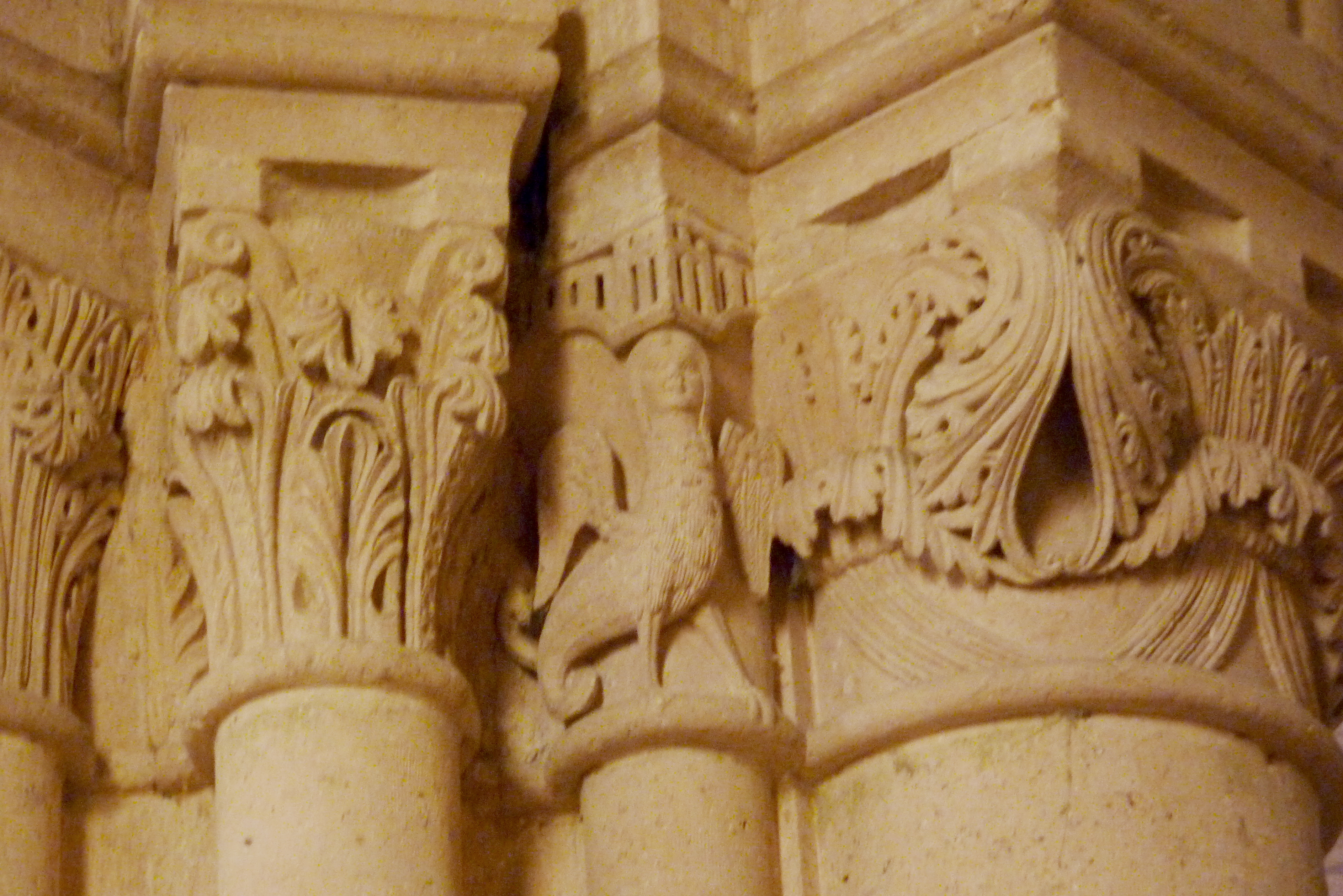 katholische Pfarrkirche Saint-Sulpice in Chars, Kapitell